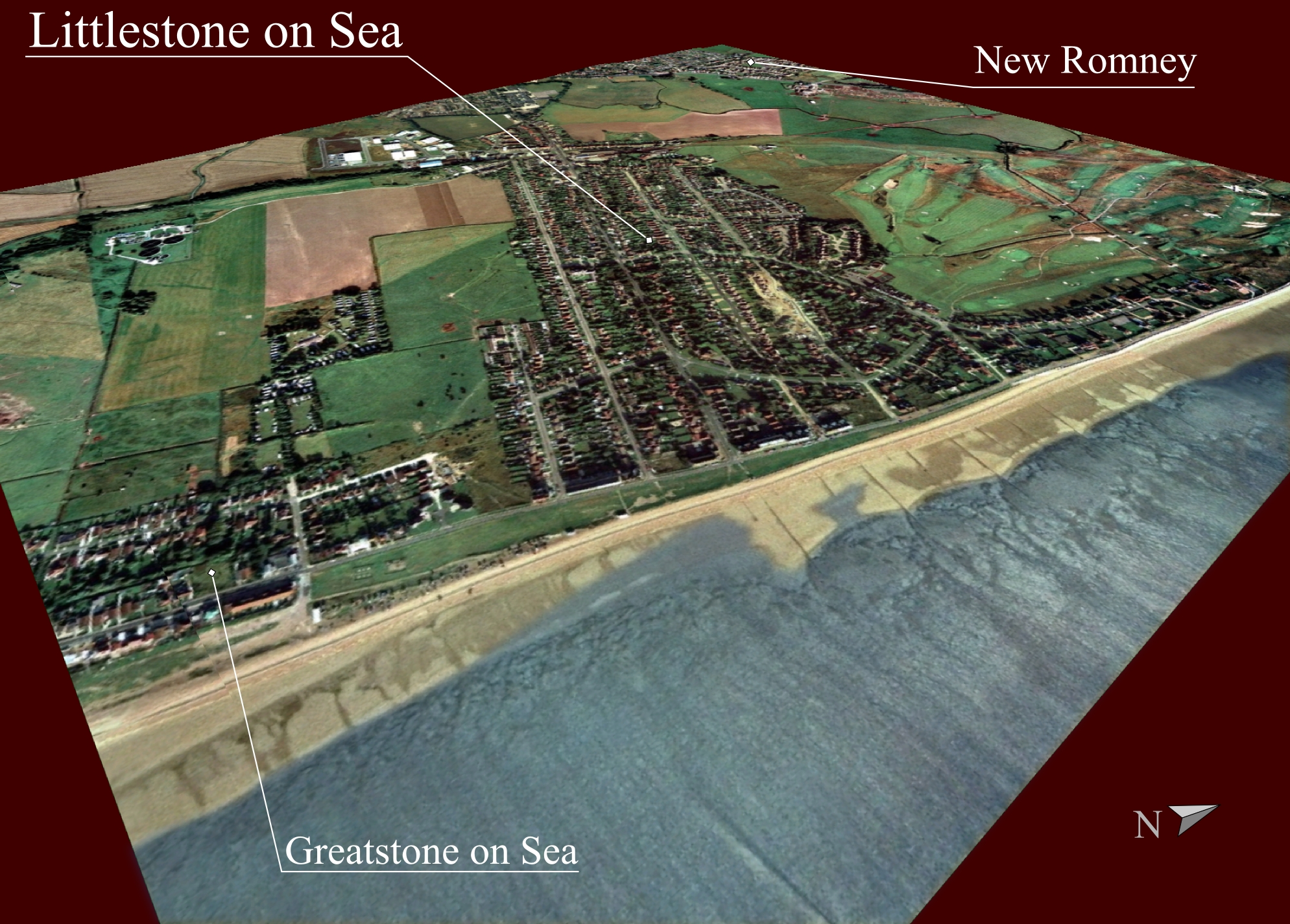 Prelucrare 3D pentru Littlestone on Sea.